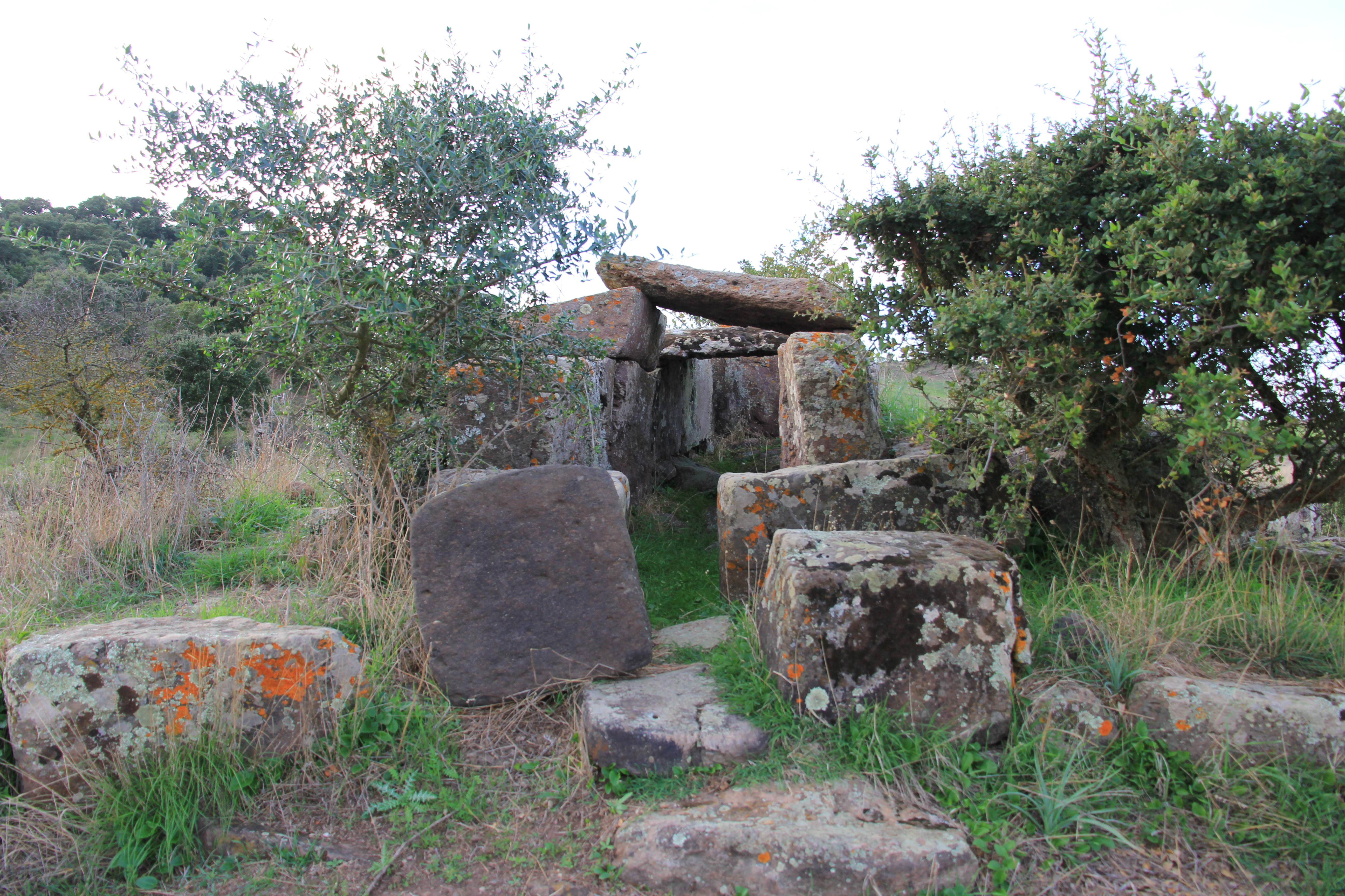 Villanova Monteleone - Tomba dei giganti di Laccaneddu